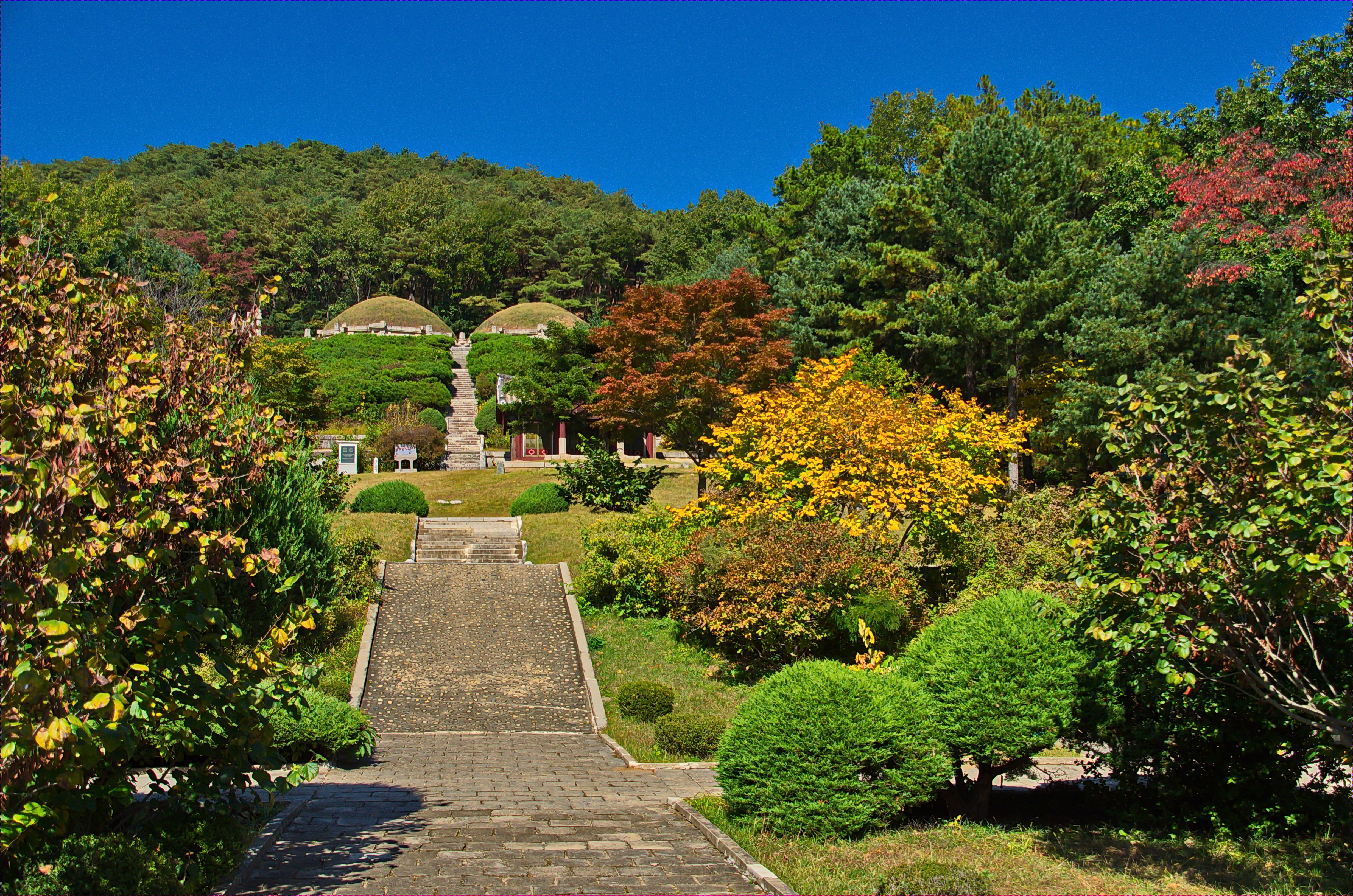 Nordkorea 2015 - Käsong - Grabmäler König Kongmih